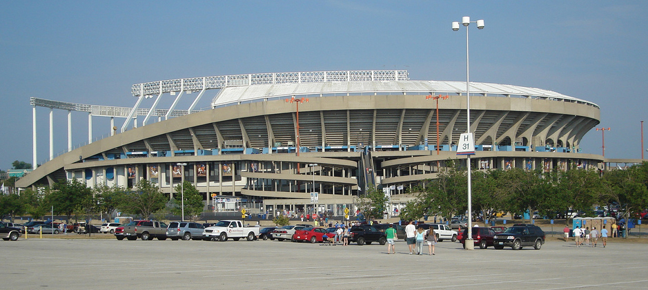 Kauffman Stadium